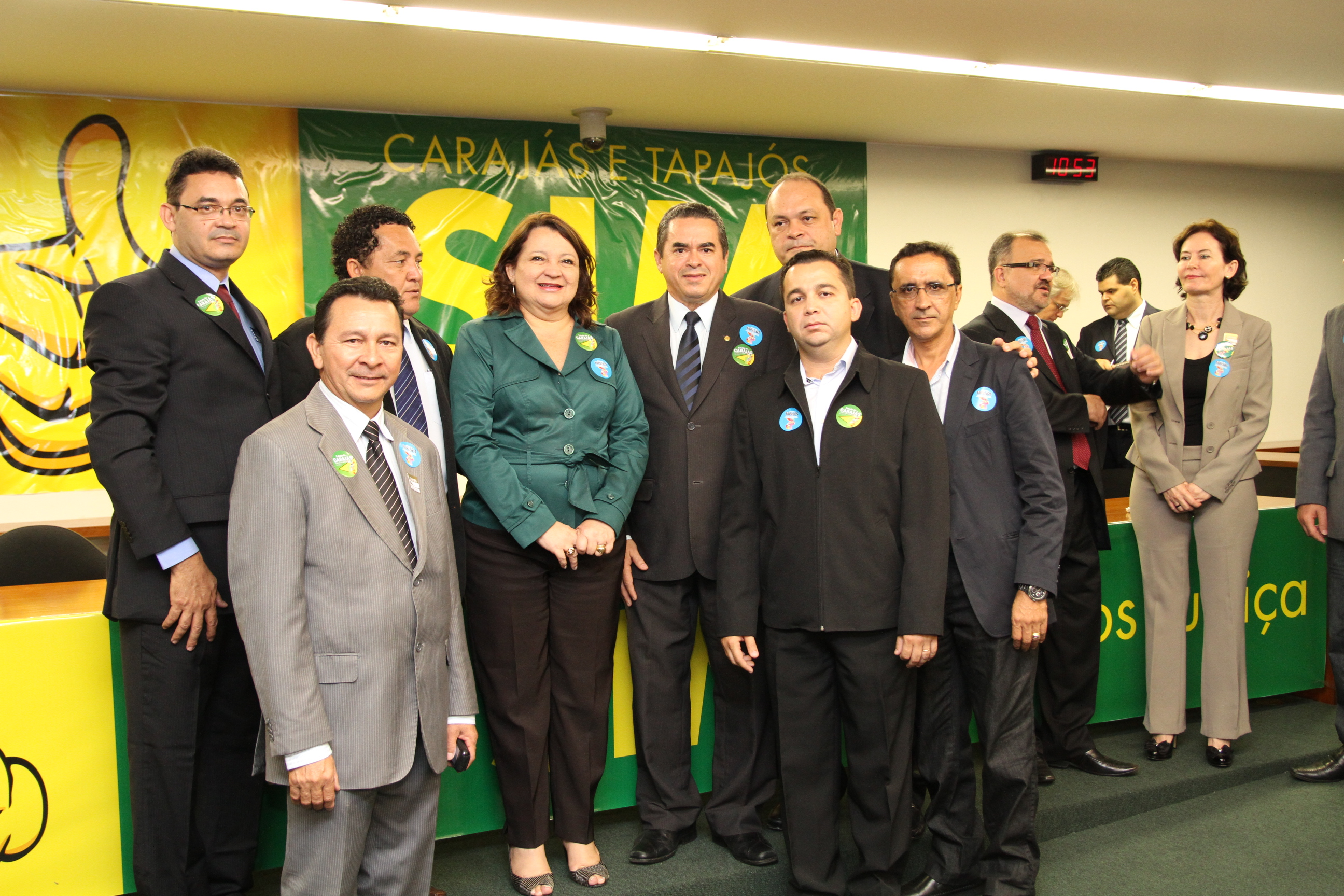 Lançadas na Câmara as Frentes Parlamentares em defesa dos estados do Tapajós e Carajás. O plebiscito para a divisão do Pará foi realizado no dia 11 de dezembro. O deputado Lira Maia (Democratas do Pará) foi eleito presidente da Frente pelo Tapajós, e o deputado João Salame eleito presidente da Frente pelo Carajás.